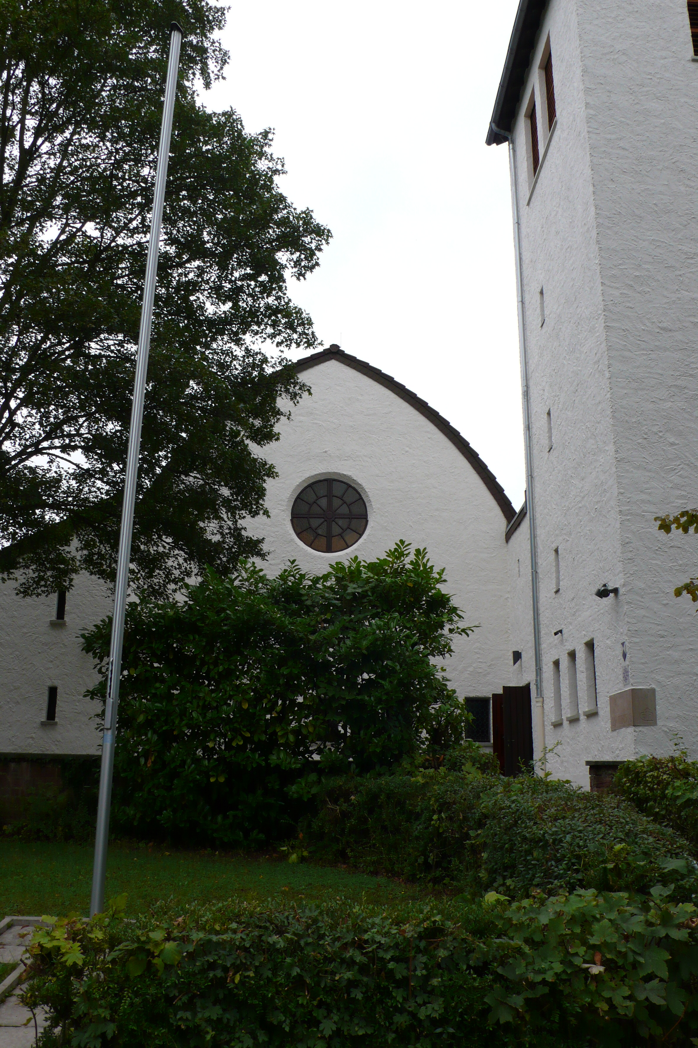 Bethanienkirche in Frankfurt am Main, eine der mehr als 40 Notkirchen des Architekten Otto Bartning